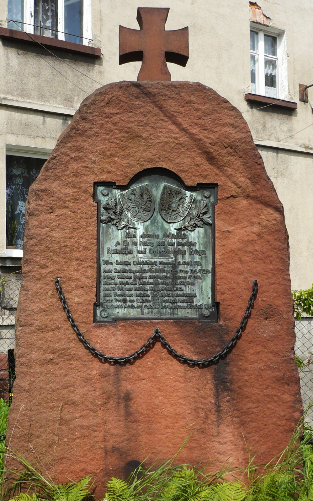 Nowa Ruda, ul. Cmentarna - cmentarz komunalny (obelisk poświęcony zmarłym w wojnie prusko-austriackiej w 1866 r.)